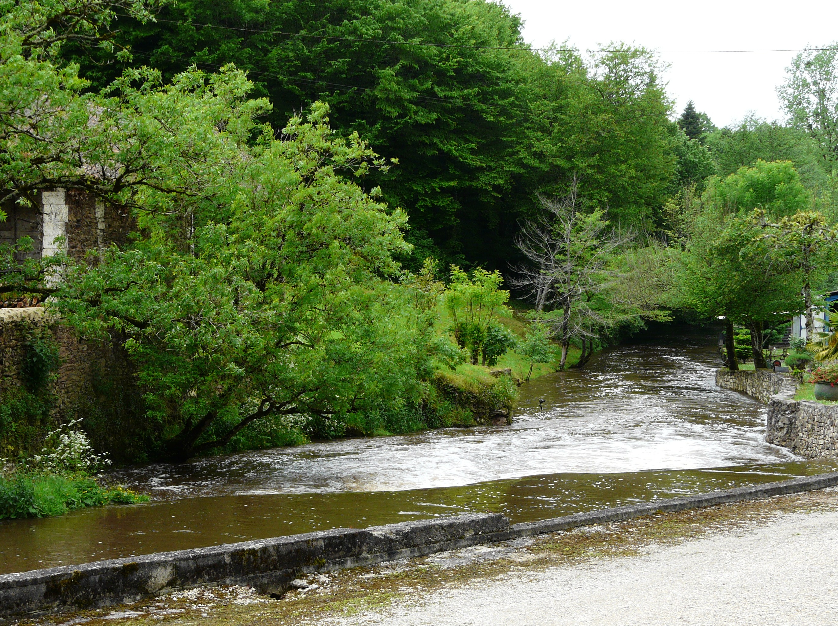 Barrage sur le Bandiat aux Roches hautes, Saint-Martial-de-Valette, Dordogne, France